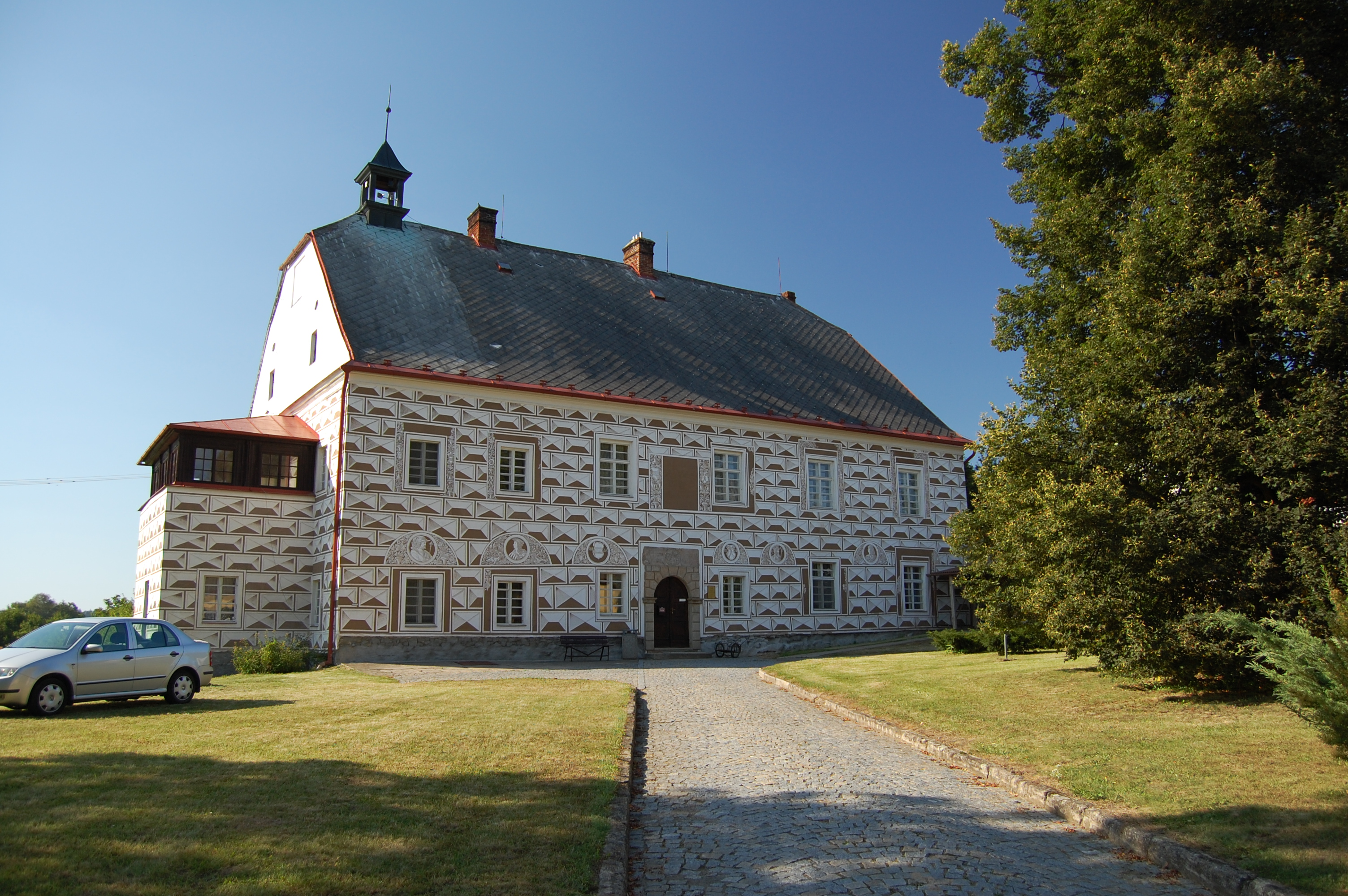 Zámek, Jaroměřice, okres Svitavy